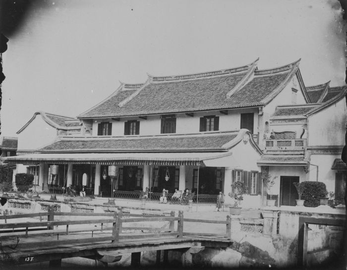 foto. Het huis van de Majoor der Chinezen Be Biauw Tjoan